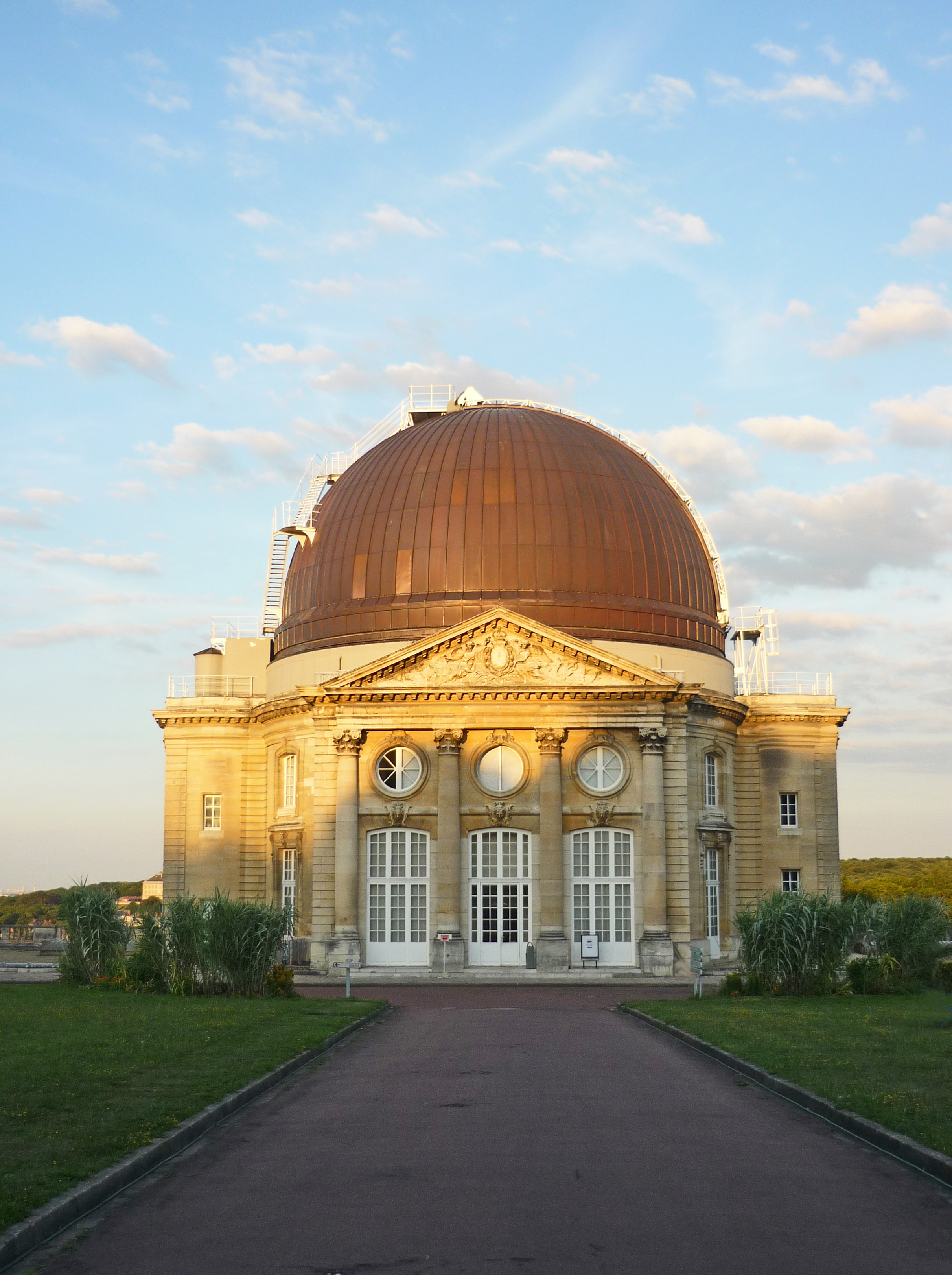 La Grande Coupole de Meudon, sur l'ancien Château Neuf de Meudon